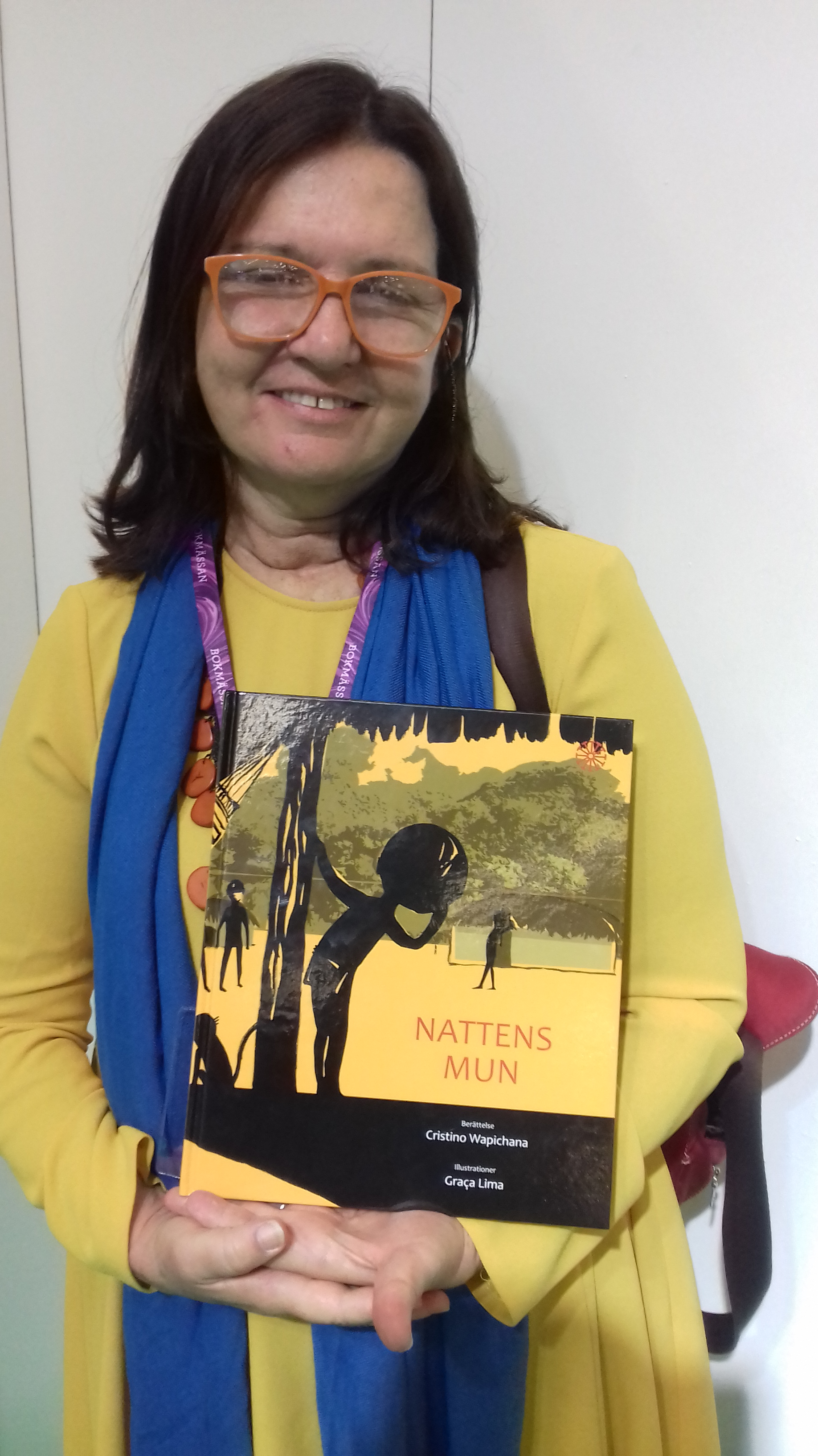 Graça Lima får Peter Pan priset för illustrationer i boken Nattens Mun, författare Christino Wapichana.